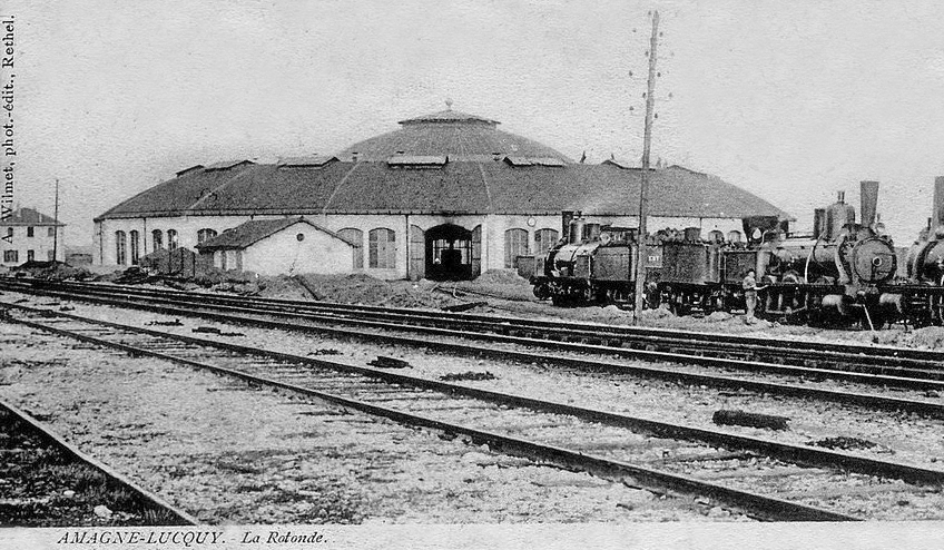 La rotonde du dépôt de locomotives de la compagnie des chemins de fer de l'Est, à côté de la gare d'Amagne-Lucquy.